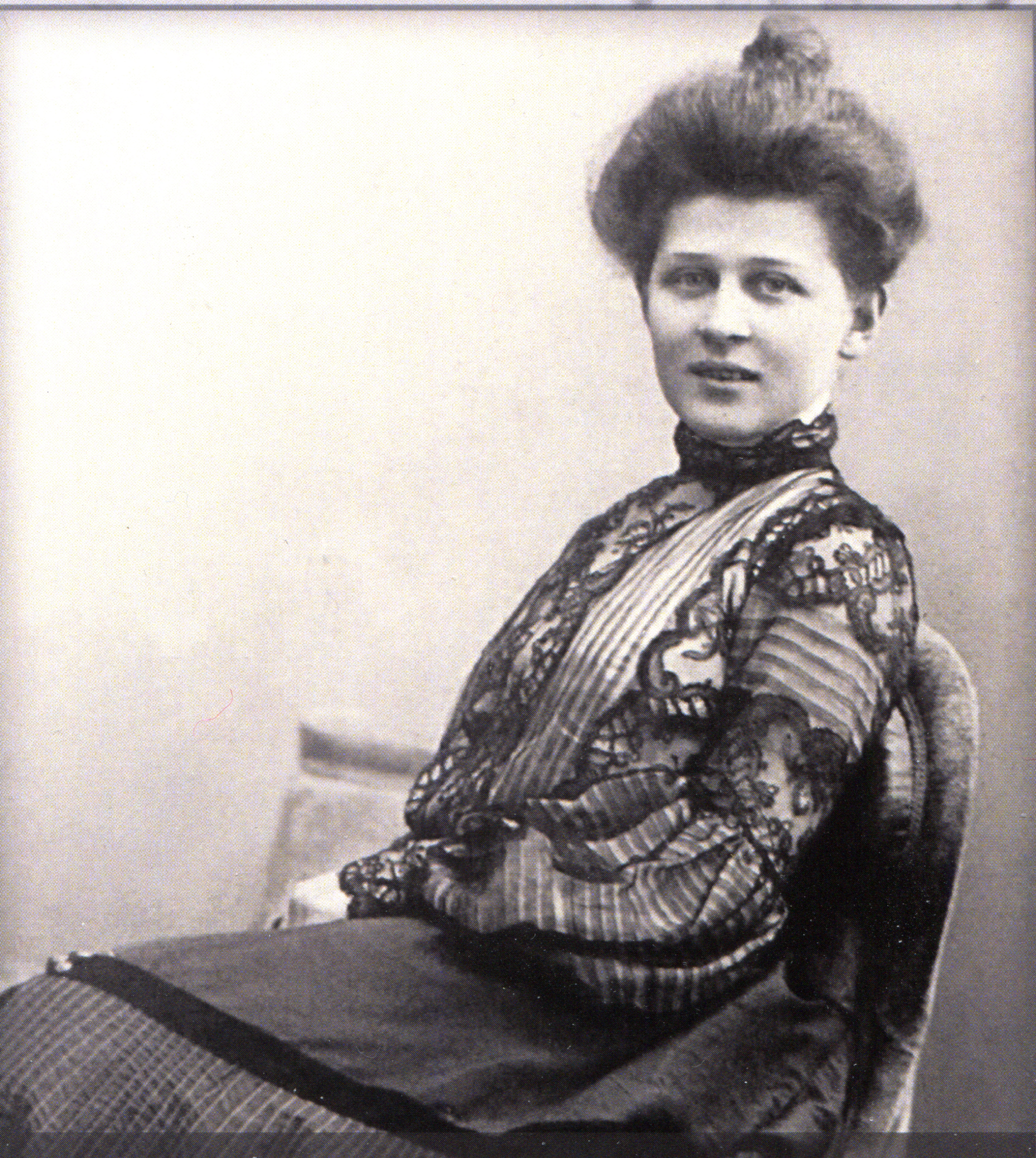 Елена Петровна Динесман, урождённая Зарина, мать эколога Льва Георгиевича Динесмана (10 ноября 1919—2005), зоолога, доктора биологических наук, пионера использования радиокарбонового метода в экологических исследованиях в СССР.